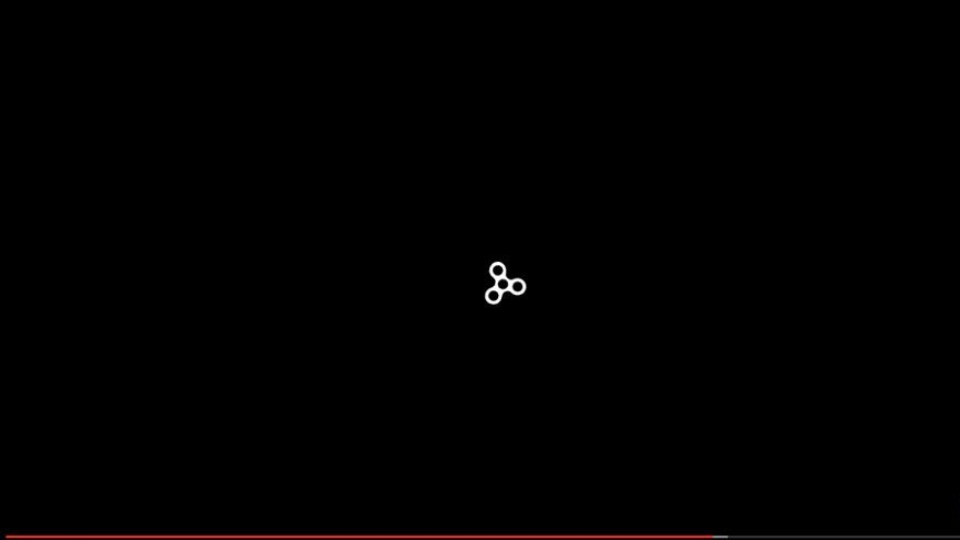 Il buffering dei video con argomento i Fidget Spinner cambia in uno di essi